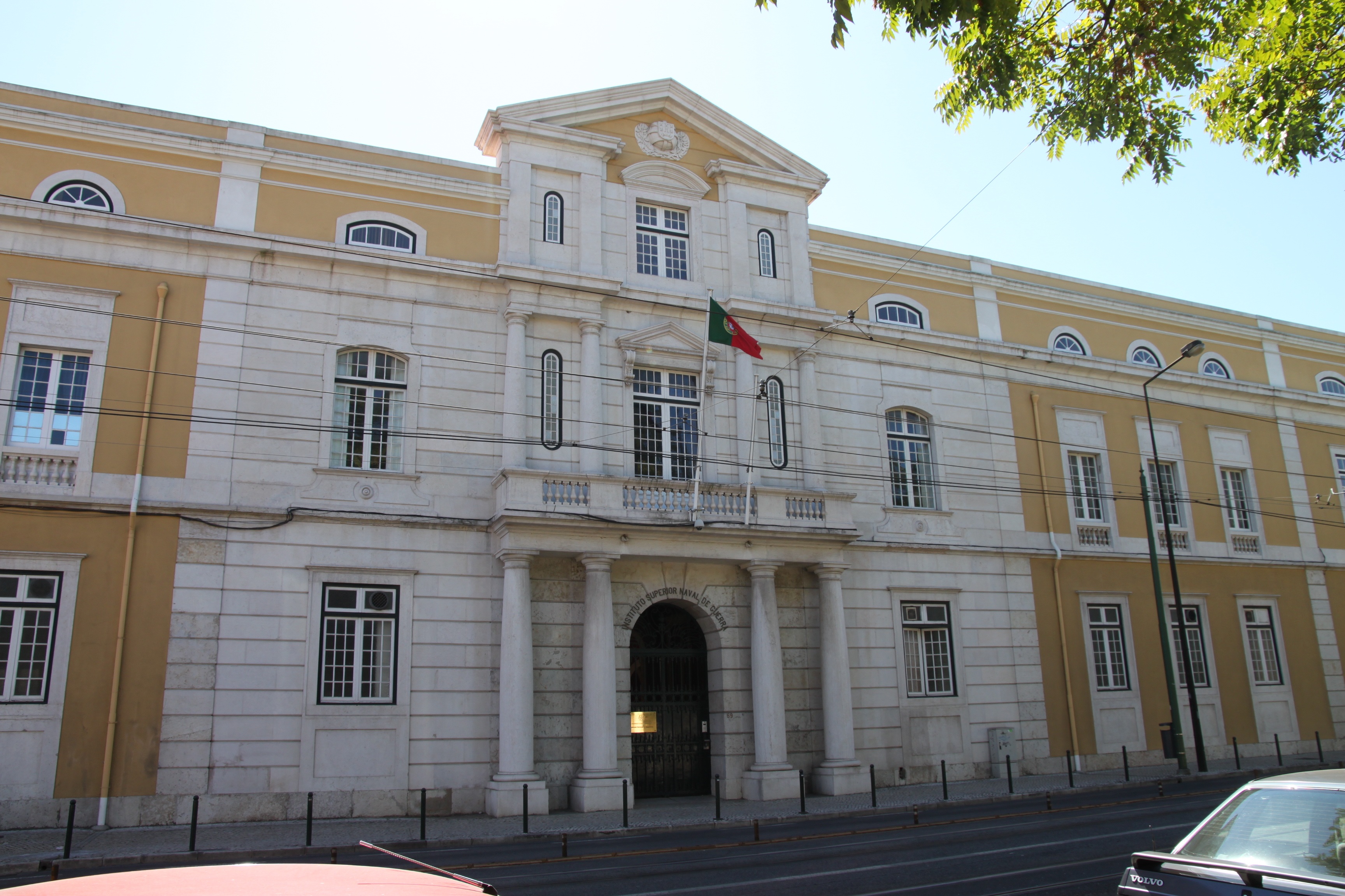 Fábrica Nacional da Cordoaria ou Cordoaria Nacional This file was uploaded for Wiki Loves Monuments in Portugal with the unique identifier 70634.